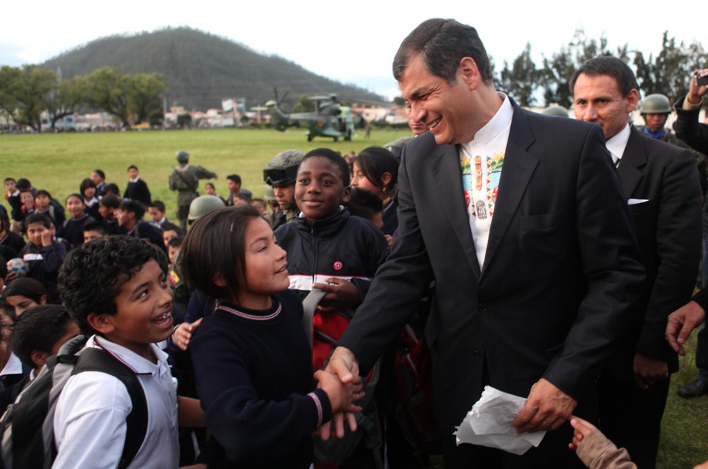 Otavalo (Imbabura), 28 sep 2011.- El Presidente Rafael Correa, saluda con la ciudadanía que salió a las calles a recibirlo. Foto: Miguel Romero/Presidencia de la República.